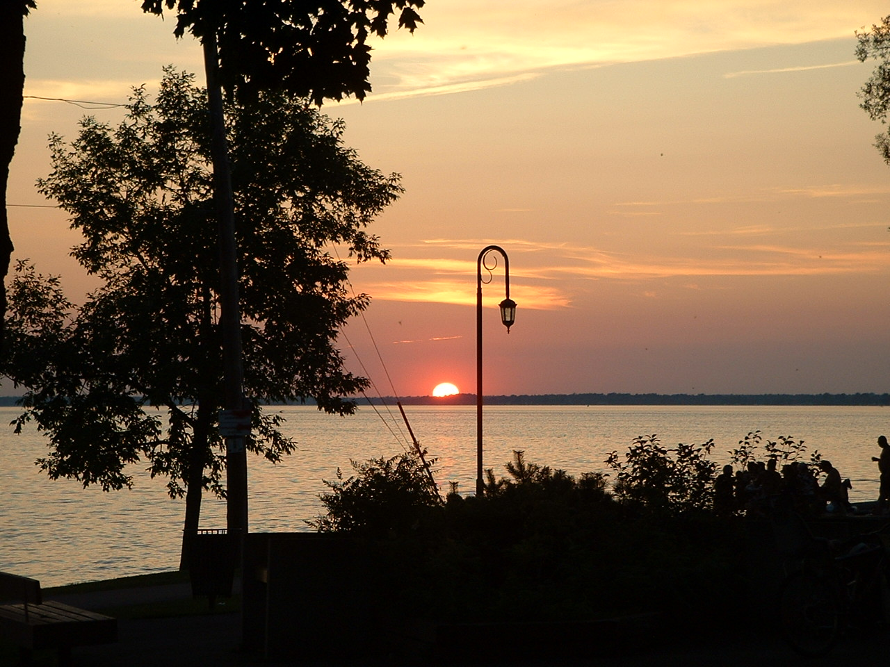 Coucher De Soleil St-Anicet Été 2003.JPG